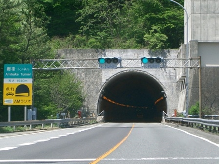 AmikakeTN(網掛トンネル下り線)